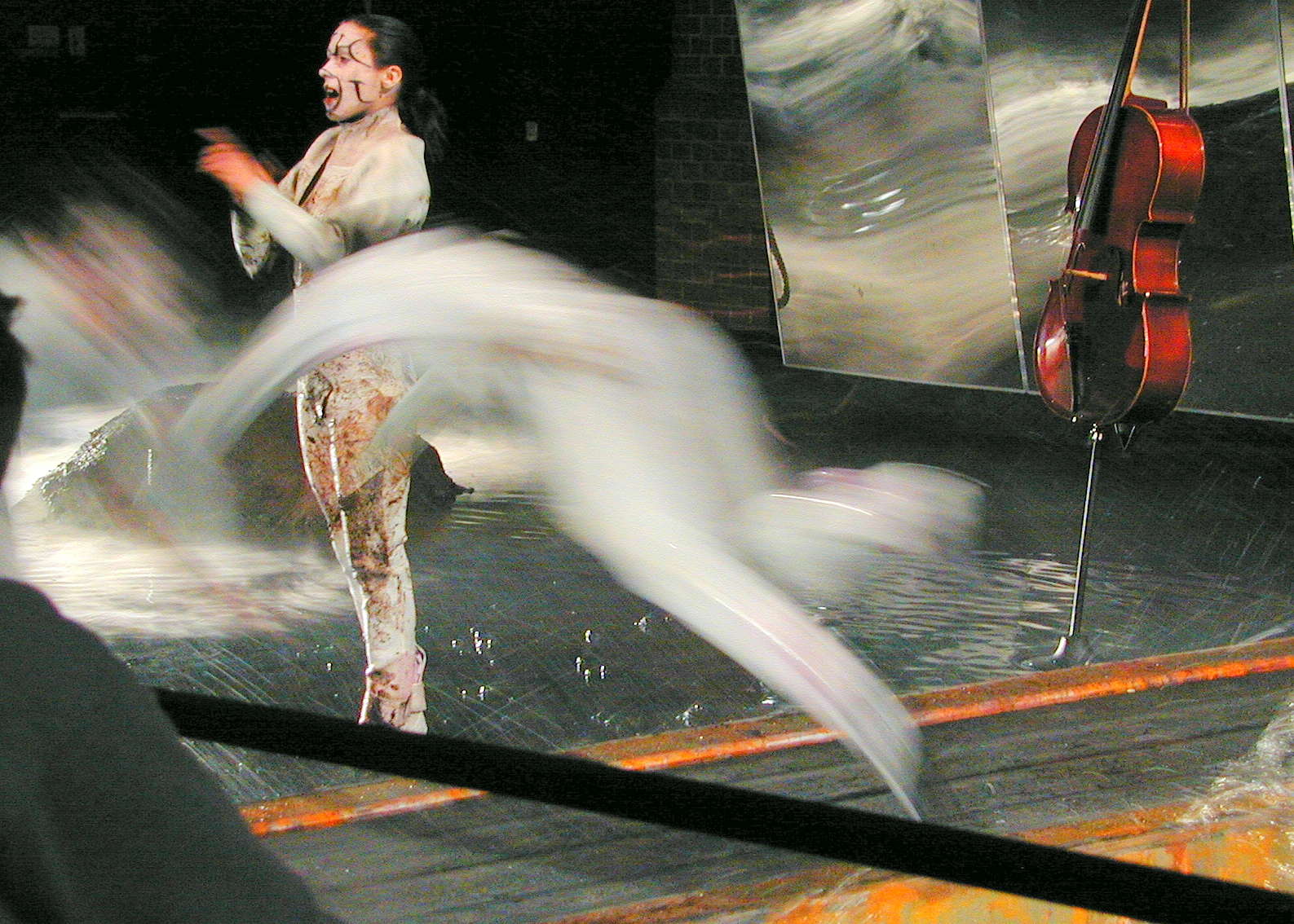 Kerstin Rullik in Bauchgeburt von Rolf Kemnitzer, Regie: Urs Odermatt. Saarländisches Staatstheater.